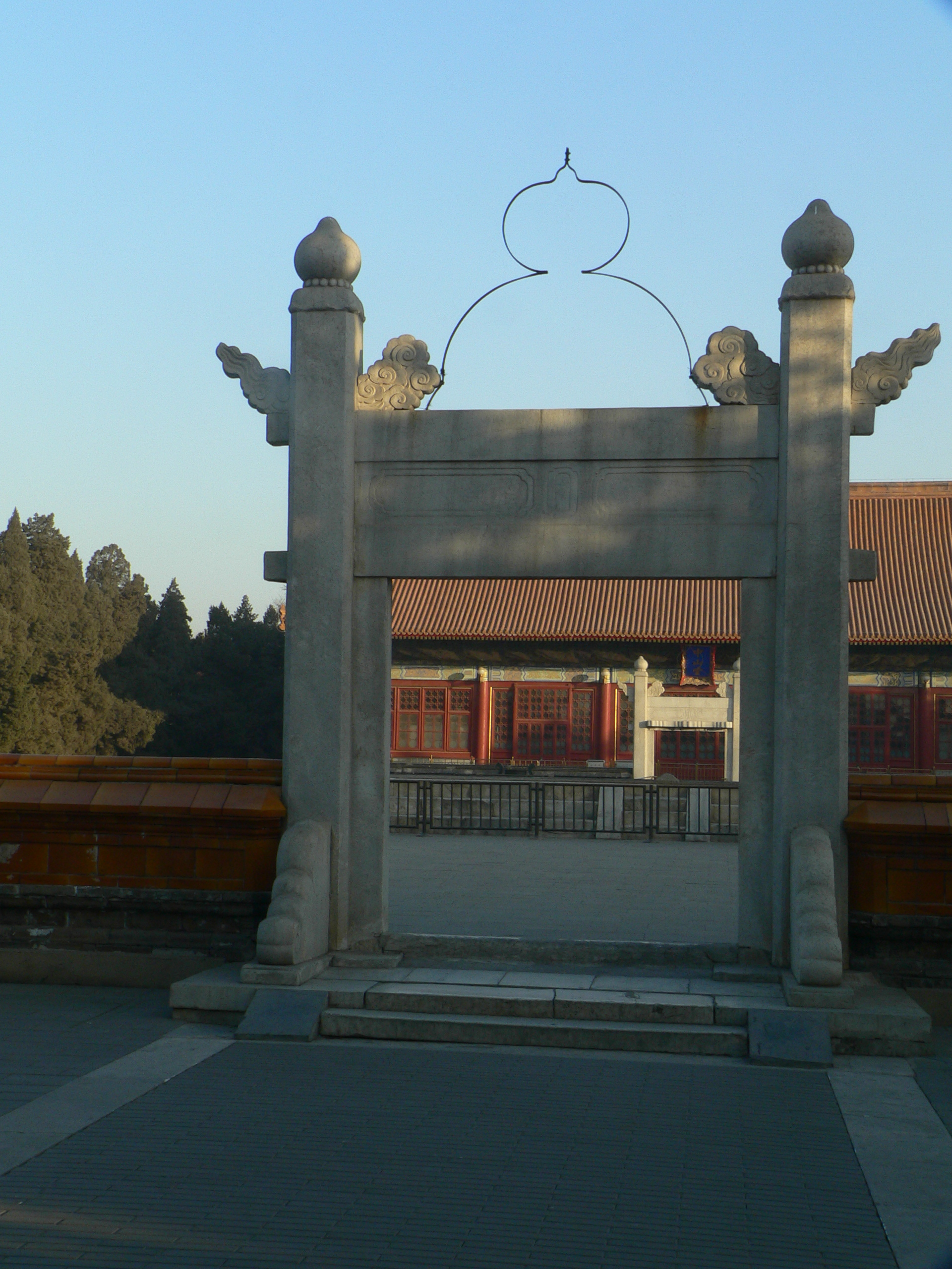 北京中山公园社稷坛/五色土的棂星门